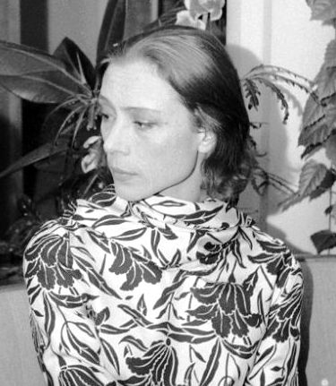 Royal Ballet uit Engeland in Hiltonhotel te Amsterdam, tijdens persconferentie